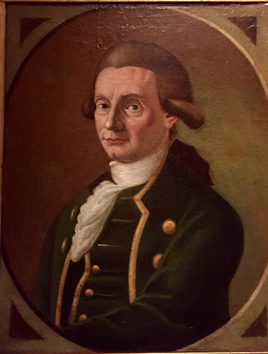 Retrato de Antonio de Olaguer y Feliú presente en el Museo Fernández Blanco de Buenos Aires. Más información: (